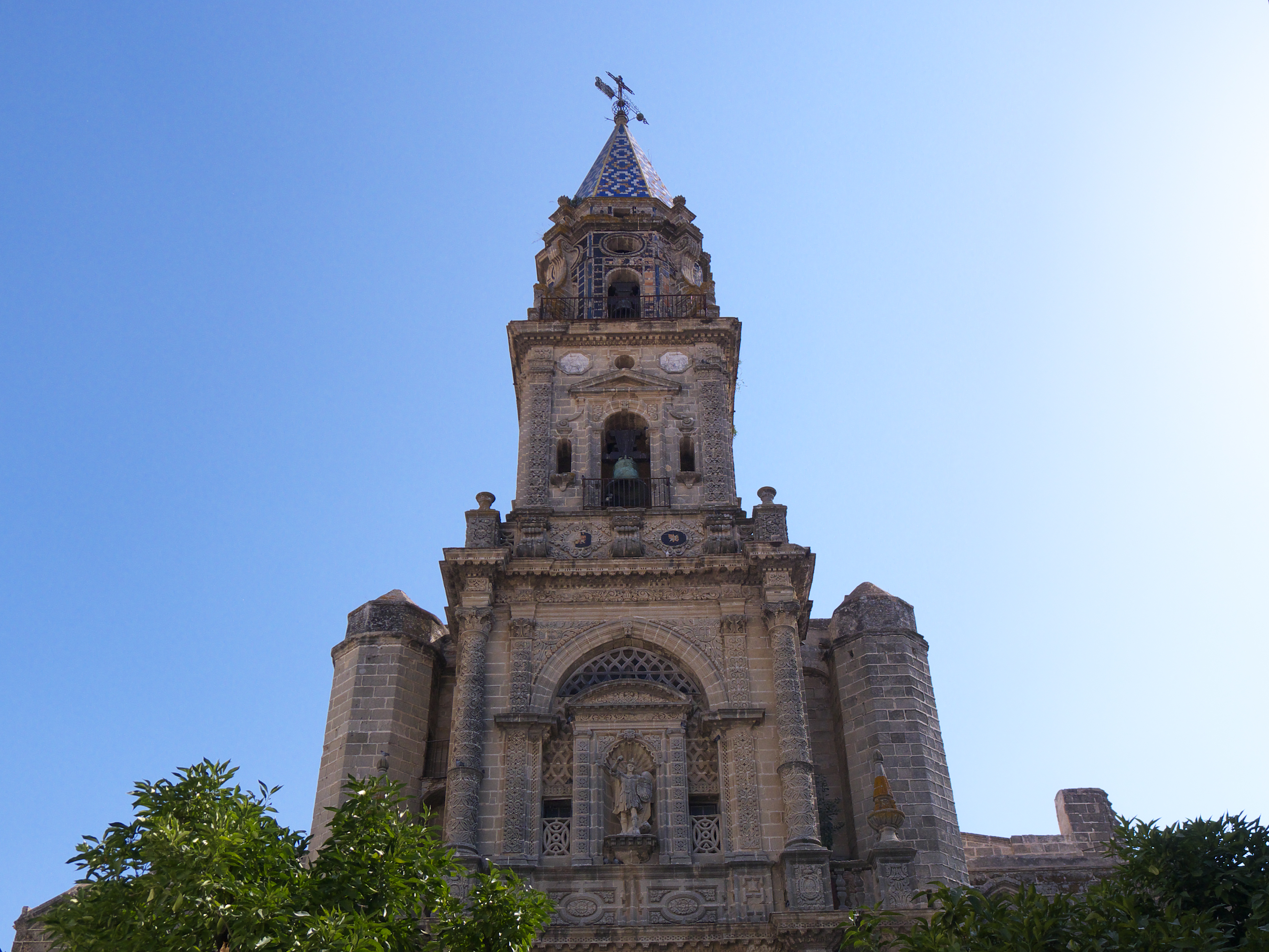 El jerezano, Diego Moreno Meléndez (Jerez, 1626-1701), sepultado en esta iglesia, finaliza esta espléndida fachada durante los últimos años de su vida (1672-1701). Fiel exponente del barroco andaluz.